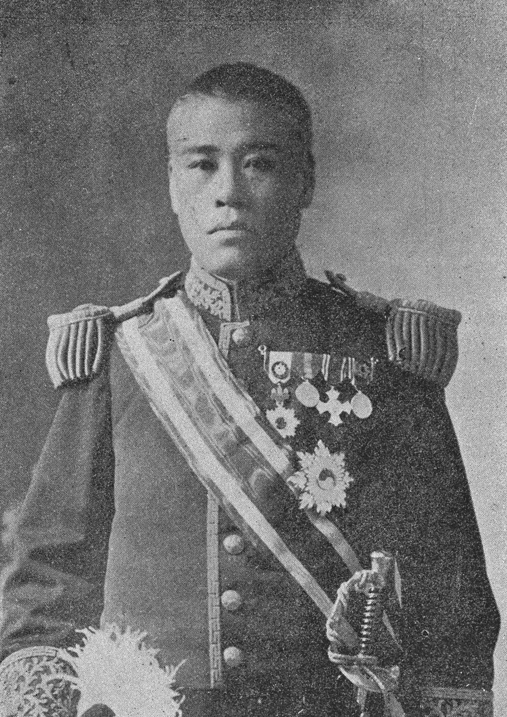 Portrait of Ikeda Norimasa (池田詮政, 1866 – 1909)